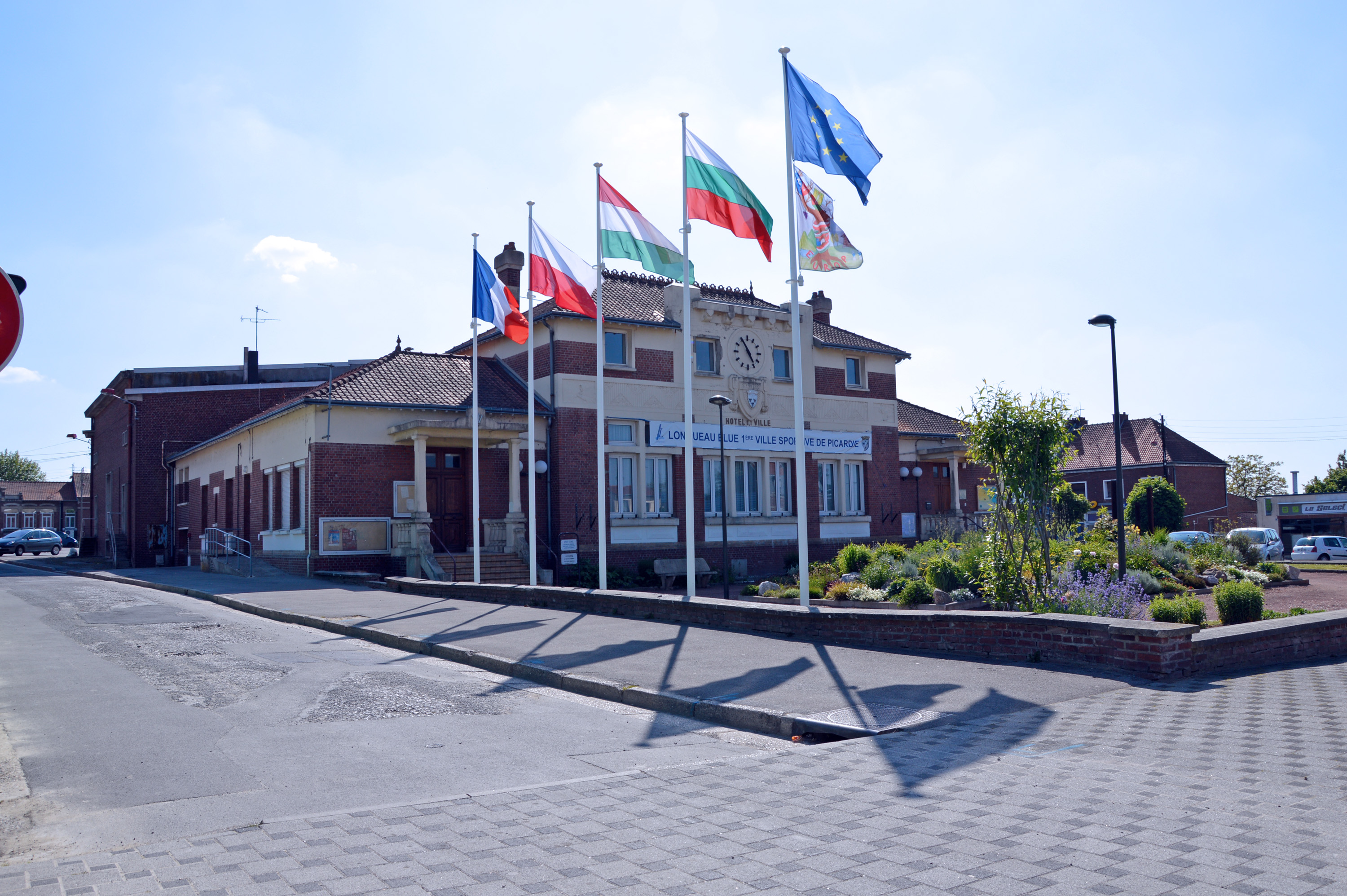 Hotel de ville de Longueau